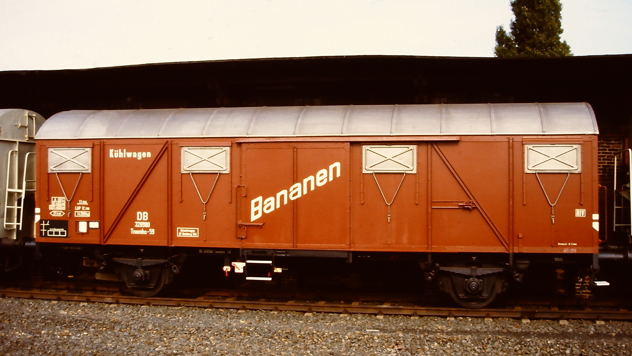 Güterwaggon Tnomhs-59 (Ibblps395), ausgestellt auf der Ausstellung 150 Jahre deutsche Eisenbahn in Bochum-Dahlhausen